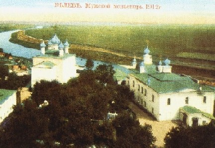 Спасо-Преображенский монастырь, Белев